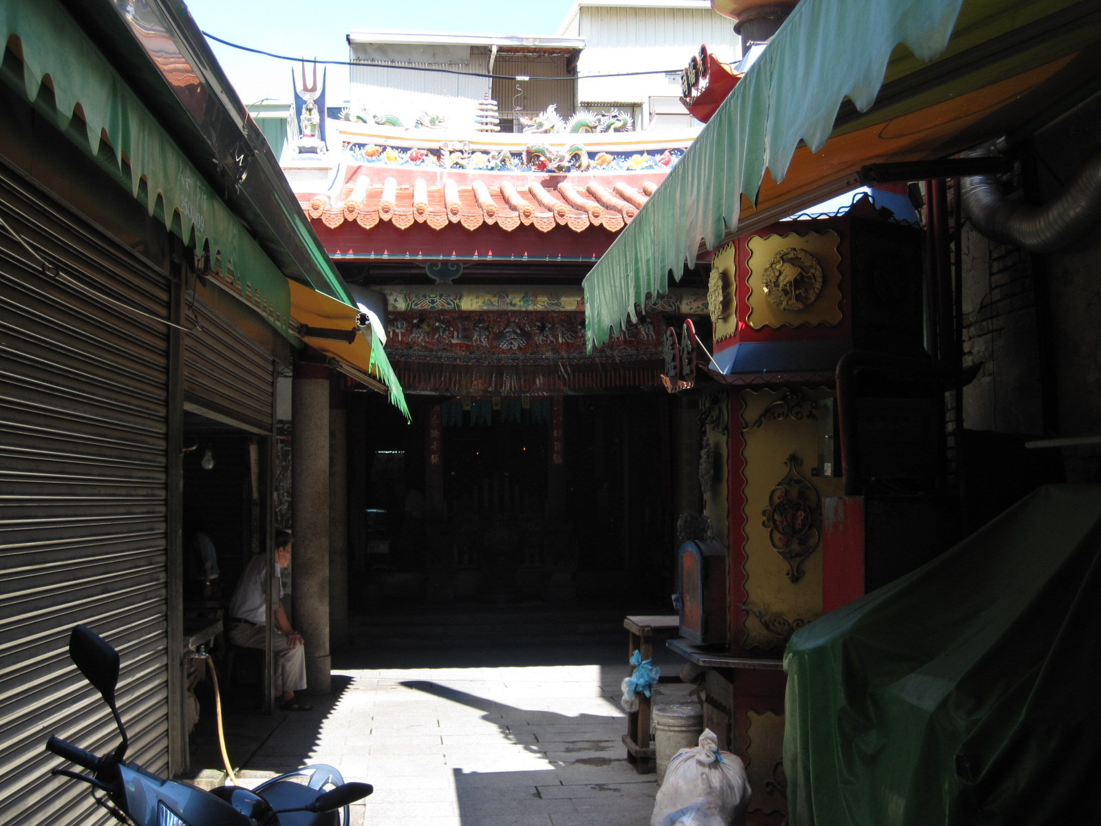 臺南景福祠